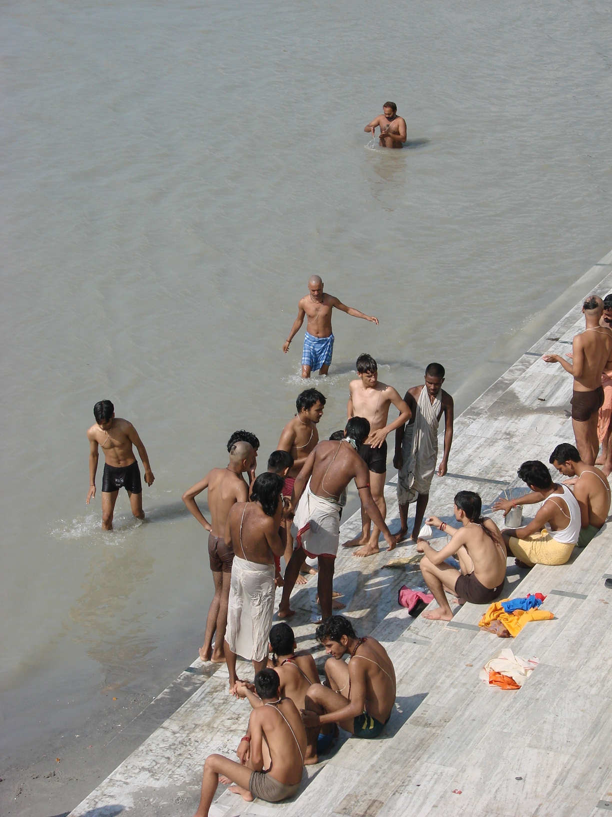 טבילה בגנגס ברישיקש (באיזור רם ג'ולה) Rishikesh